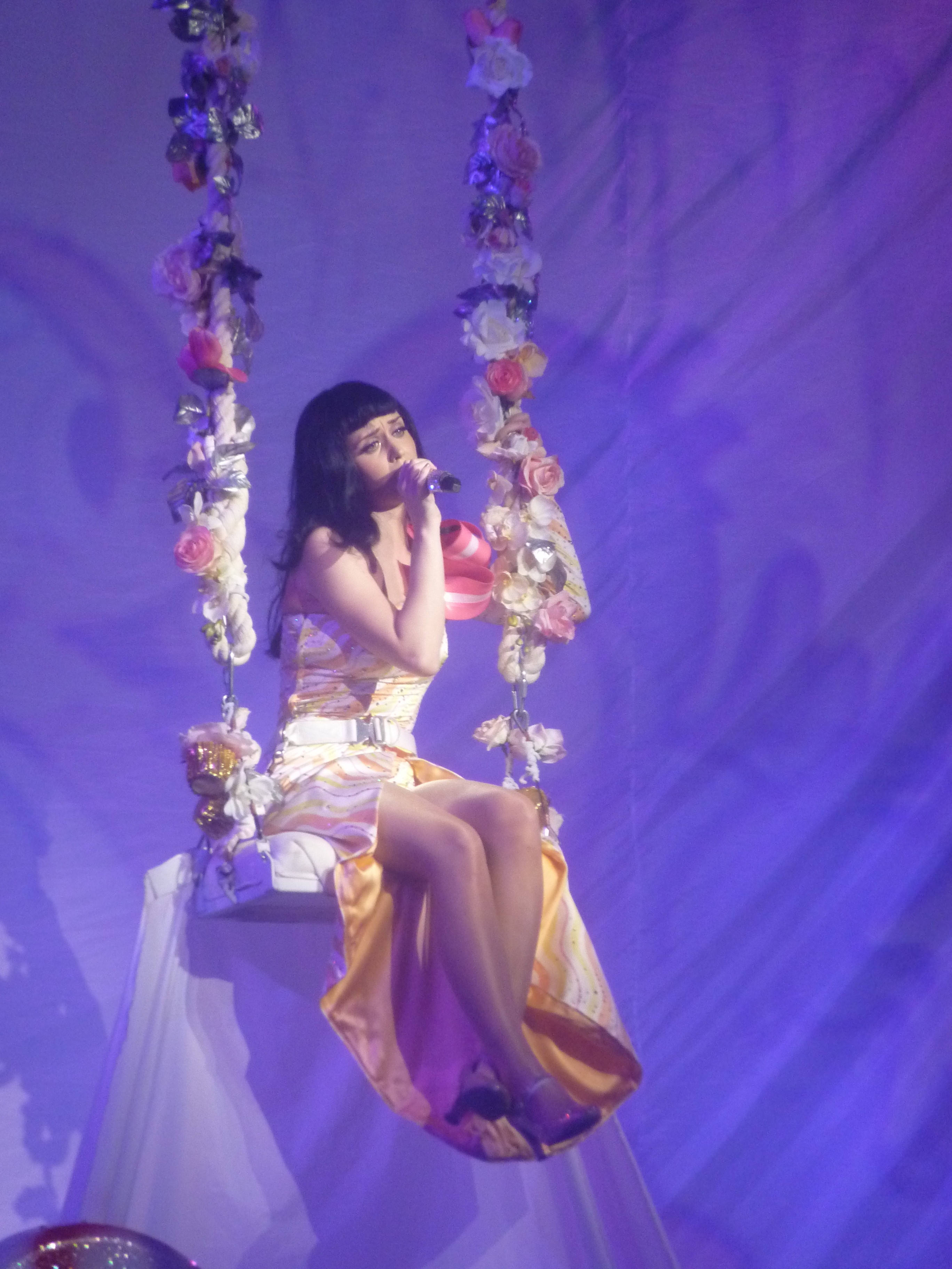 Photos de Katy Perry en concert au Zenith de Paris en mars 2011 dans le cadre de sa tournée " California Dreams Tour "